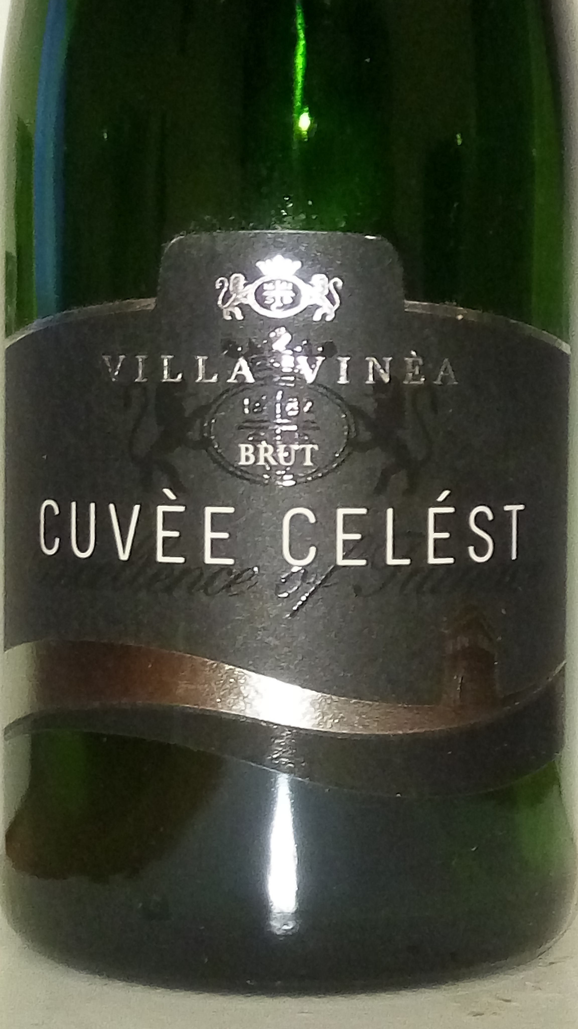 Vin spumant românesc obținut prin metoda tradițională